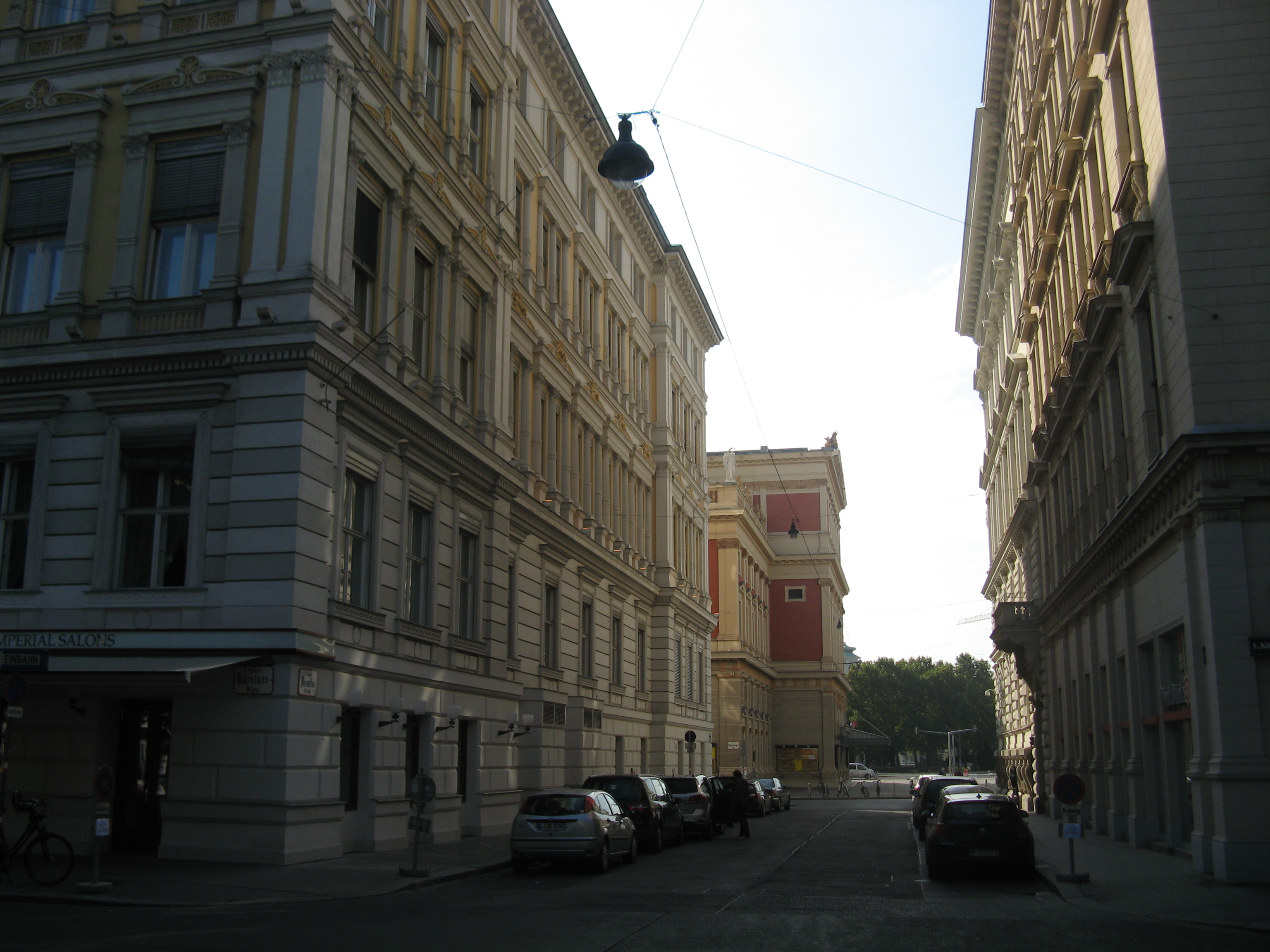 Dumbastraße von der Ringstraße gegen Musikvereinsplatz gesehen, Wien-Innere Stadt